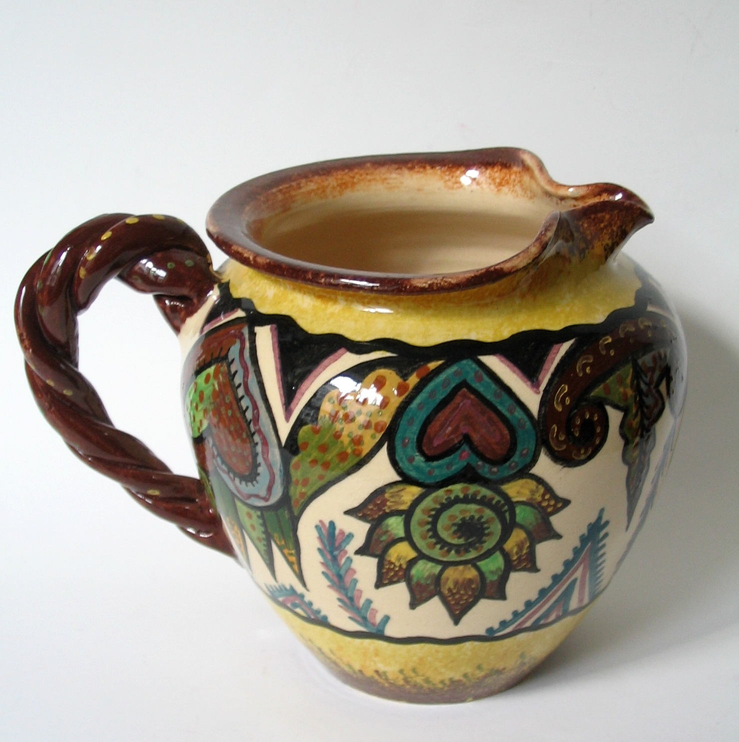 Pichet par Maurice Fouillen, Faïence de Quimper, France